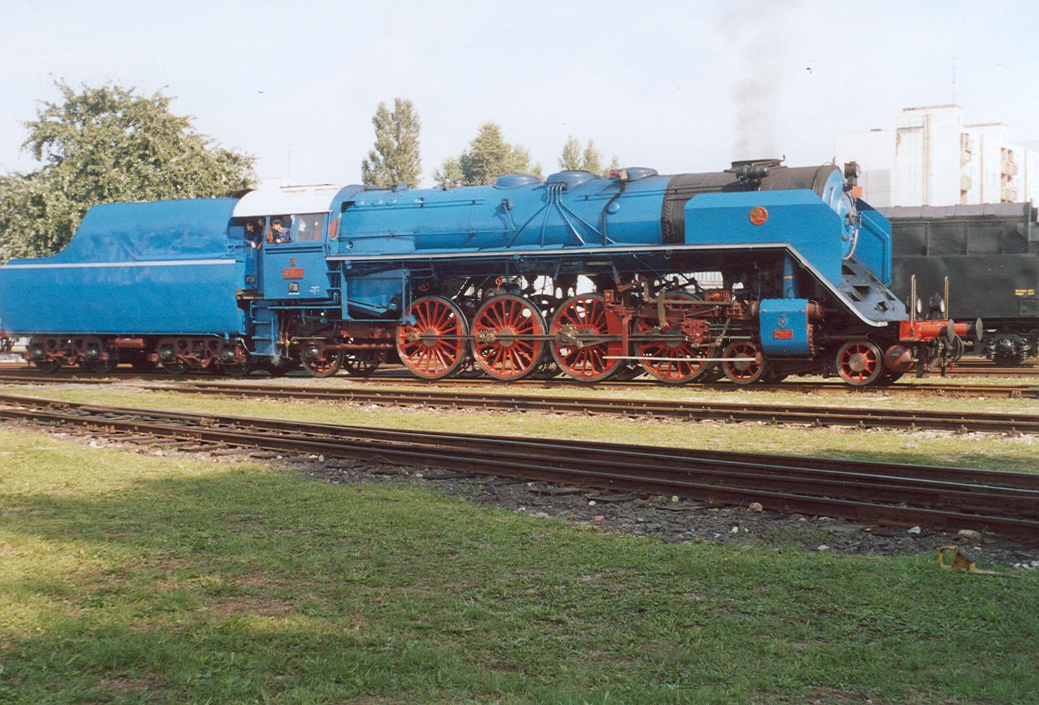 498.022 in Bratislava východ